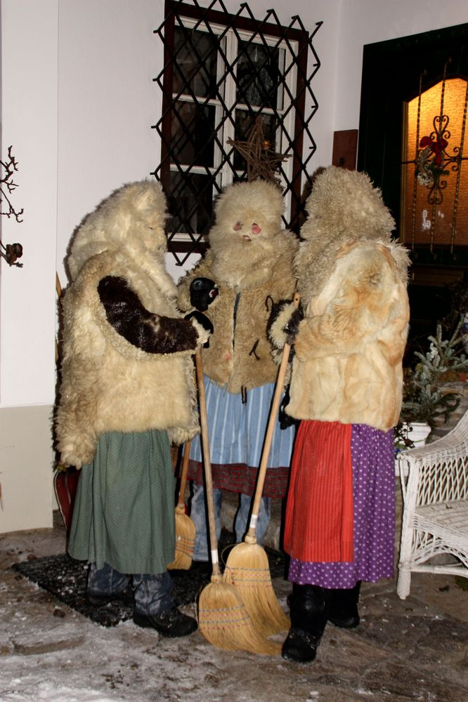 Ihr Name steht wohl im Zusammenhang mit der Sagengestalt der Perchta, die allerdings ihrerseits eine ungeklärte Herkunft hat. Eine Theorie zur Namensgebung geht davon aus, dass sich der Begriff von mittelhochdeutsch berchttac, berchtnacht, dem mittelalterlichen Wort für den Feiertag der Erscheinung des Herrn (Epiphanias), heute das Dreikönigsfest am 6. Januar, herleitet; mittelhochdeutsch bercht bedeutete ‚glänzend‘, ‚leuchtend‘. In Altaussee gibt es daneben auch Pelzperchten (Bärigln)[8]. Am 5. Januar ist der so genannte Glöckötåg (Glöcklertag). Am Abend (ca. 17h) findet auf einem zentralen, meist tief verschneiten Feld im Dorfzentrum ein symbolischer Kampf der den Frühling repräsentierenden, laut läutenden „Glöckler“ mit den Bärigln (Pelzperchten) statt, die den Winter repräsentieren. Die Glöckler versuchen den Winter "auszuläuten" die Perchten wehren sich vehement dagegen wodurch ein wilder Kampf entsteht. Um Mitternacht ist der Spuk dieser letzten Rauhnacht vorbei.Der Percht kontrolliert das Haus auf Sauberkeit – ganz im Sinne der Frau Perchta-Sage – und darf, während er sein Gesicht noch verborgen hält, kein Wort sprechen.